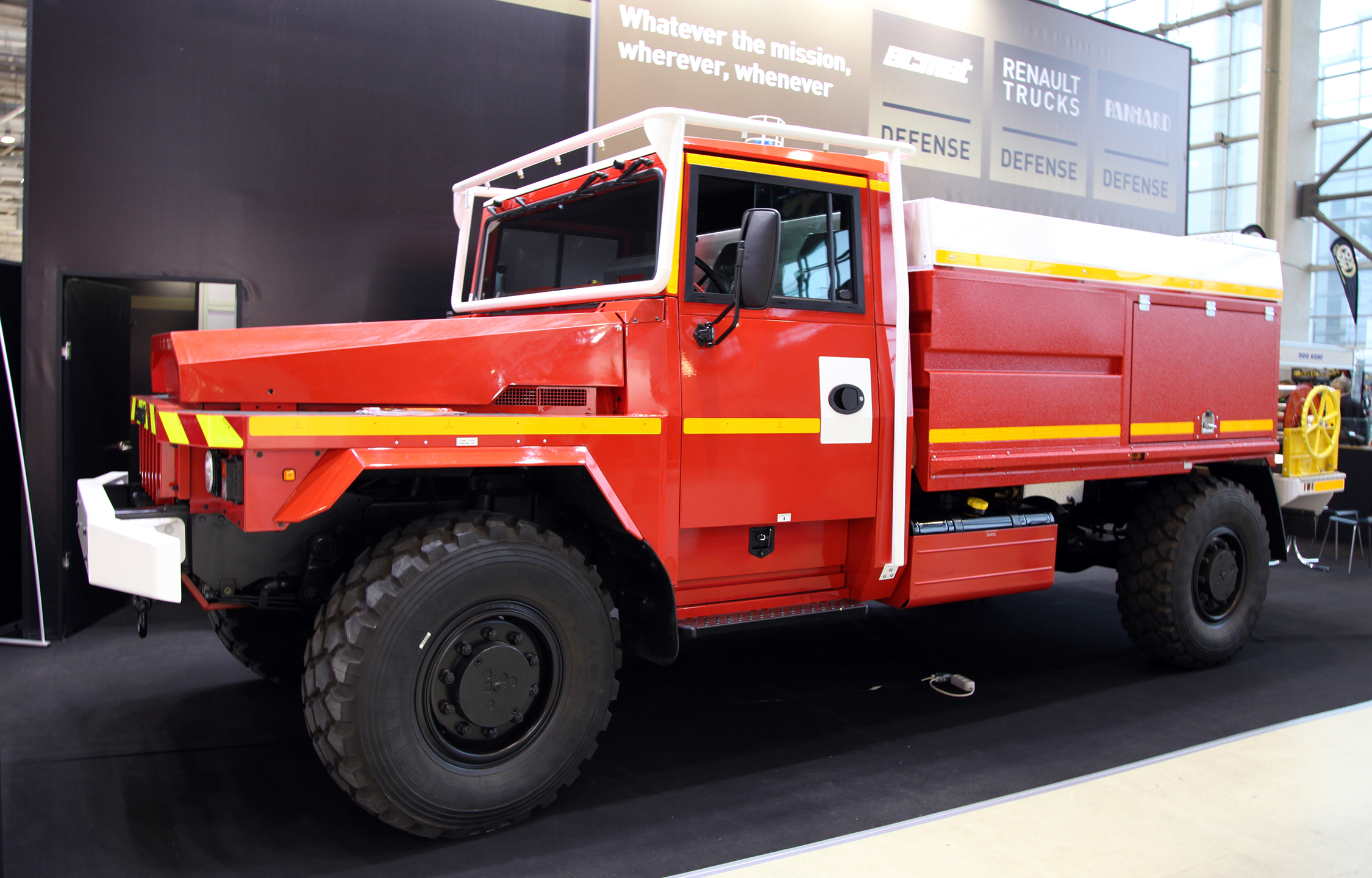 Спецавтомобиль Acmat VLRA 4.43 CCF